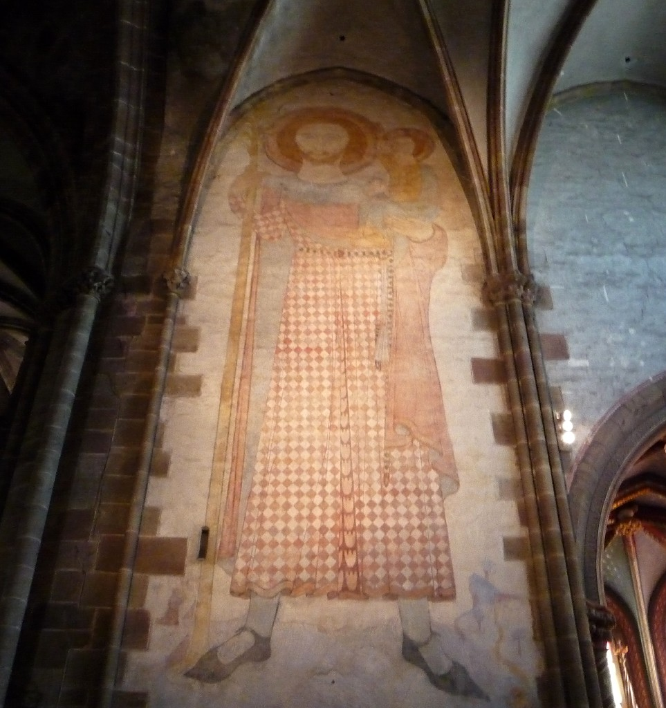 Peinture murale de Saint Christophe tenant l'enfant Jésus, église Saint-Pierre et saint-Paul, Wissembourg. La peinture fait 11 mètres de haut et date probablement du XIVe siècle.